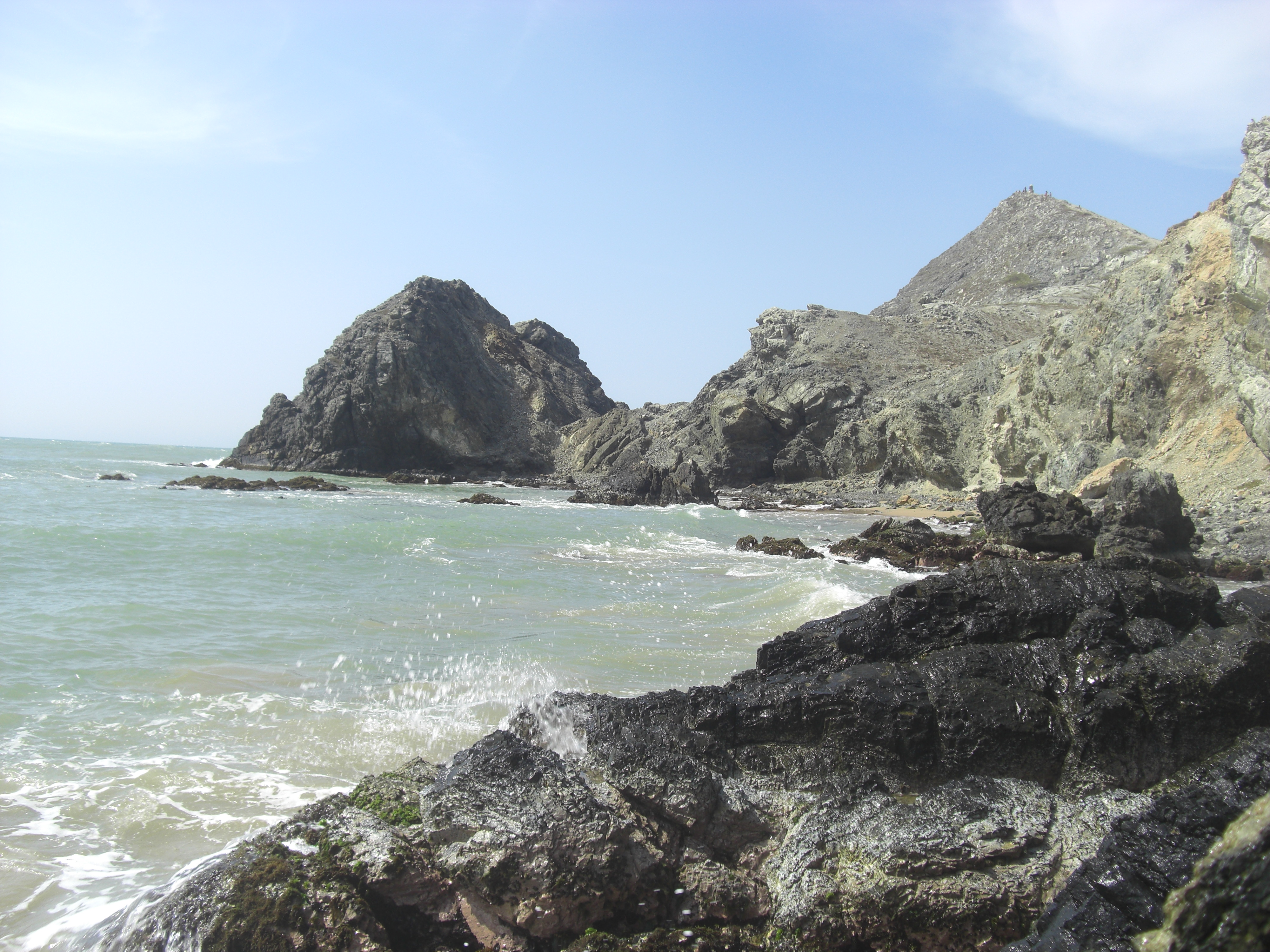 Playa junto al Pilon en Guajira